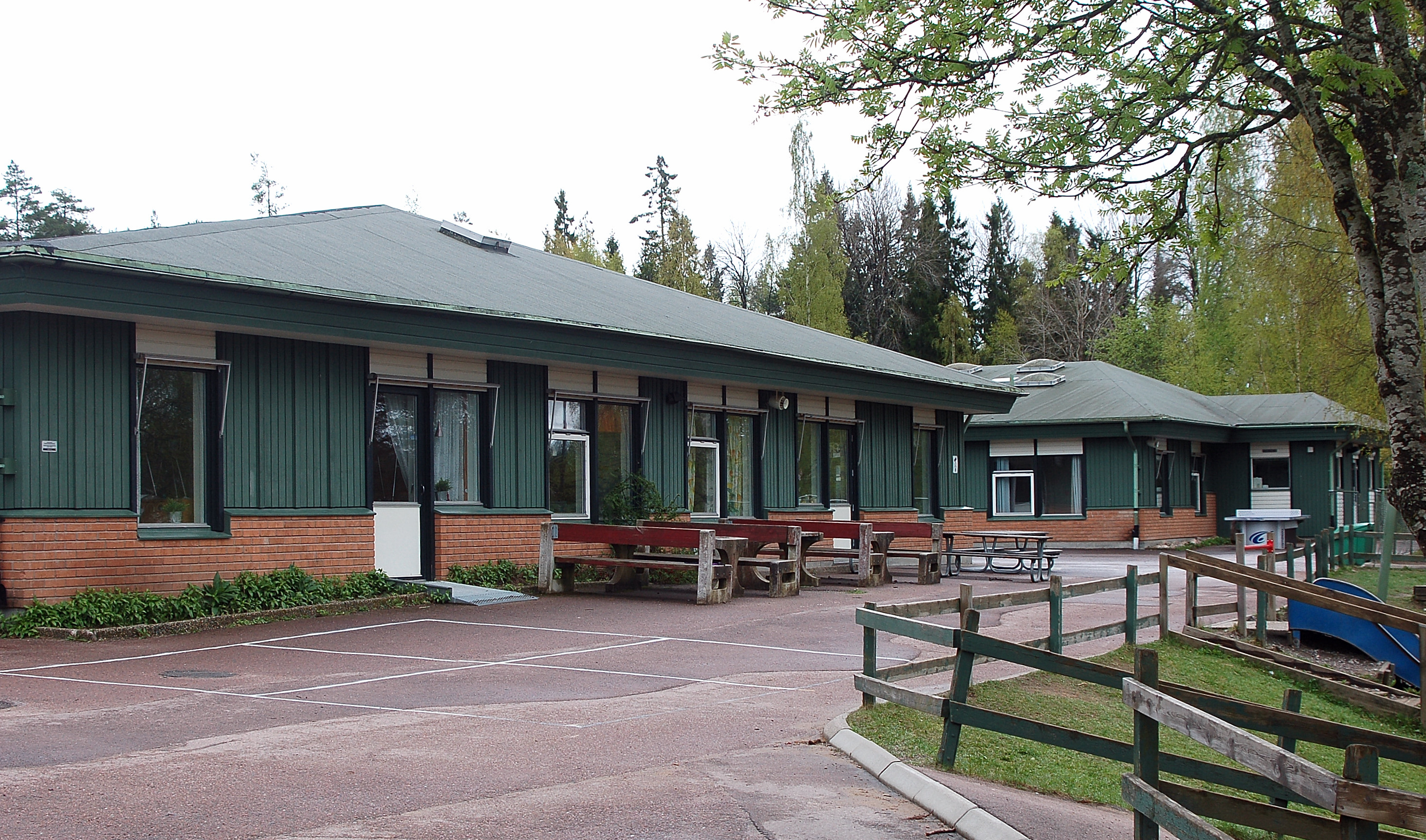 Hultsbergsskolan Hultsberg, Karlstad